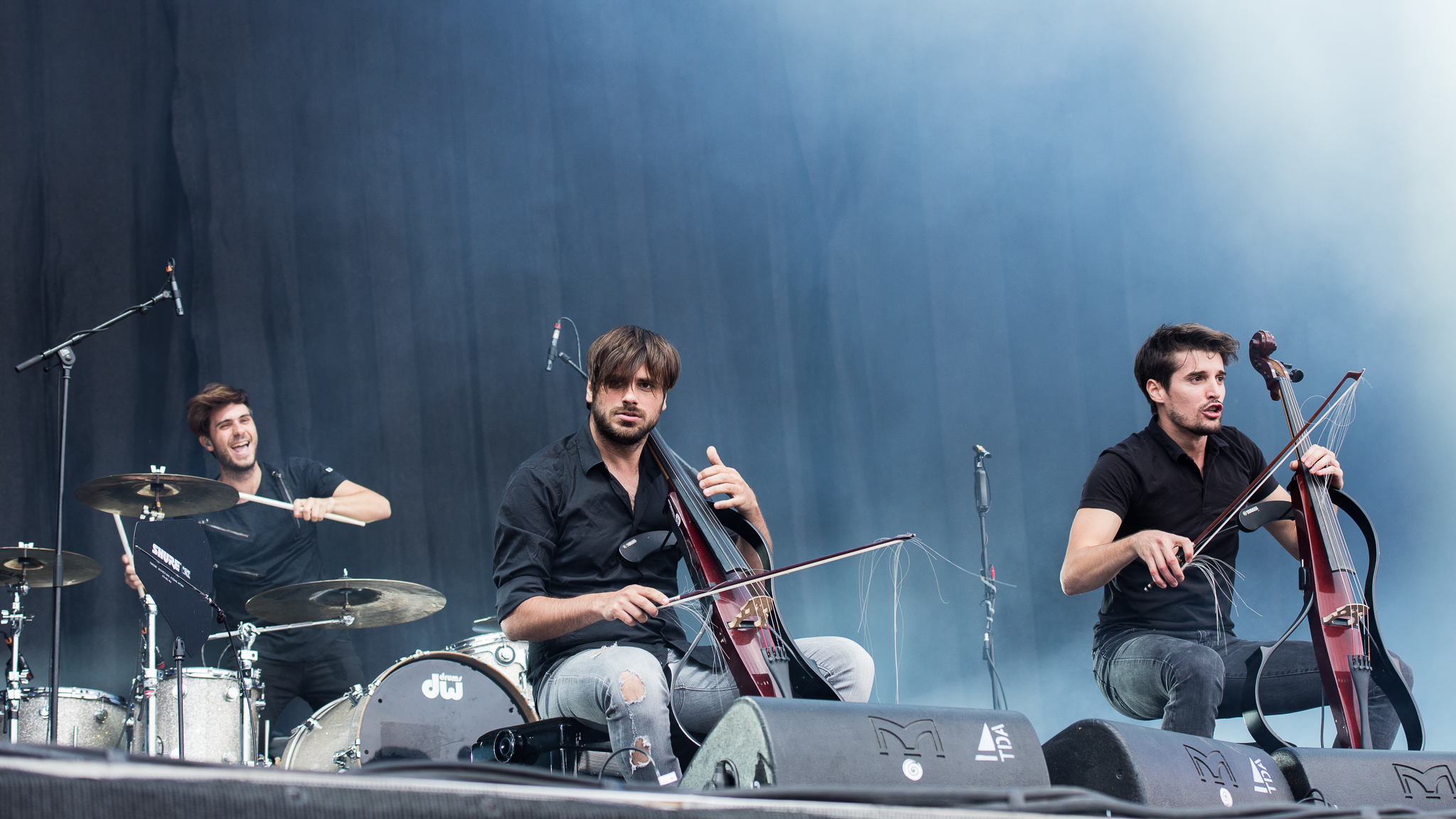 2Cellos,ARGO-Konzerte,Beck's Park Stage,Konzert,Livekonzert,Livemusik,Luka Šulic,Musik,RiP,Rock im Park 2017,Stjepan Hauser